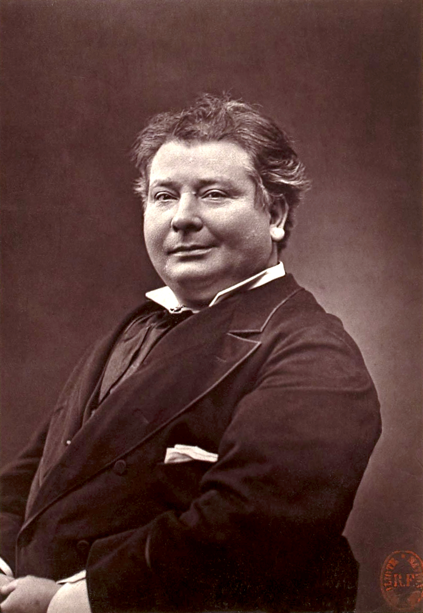 Portrait photographique de Michel-René Thibault, dit Daubray (1837-1892), acteur et chanteur d'opérette dans “Paris-Théâtre”.